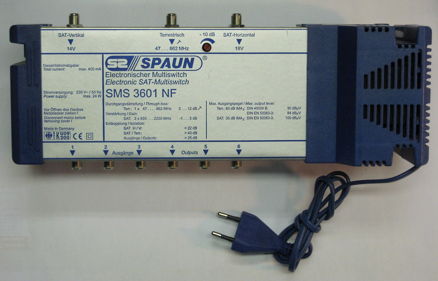 Analogtauglicher Multischalter mit 8 Ausgängen